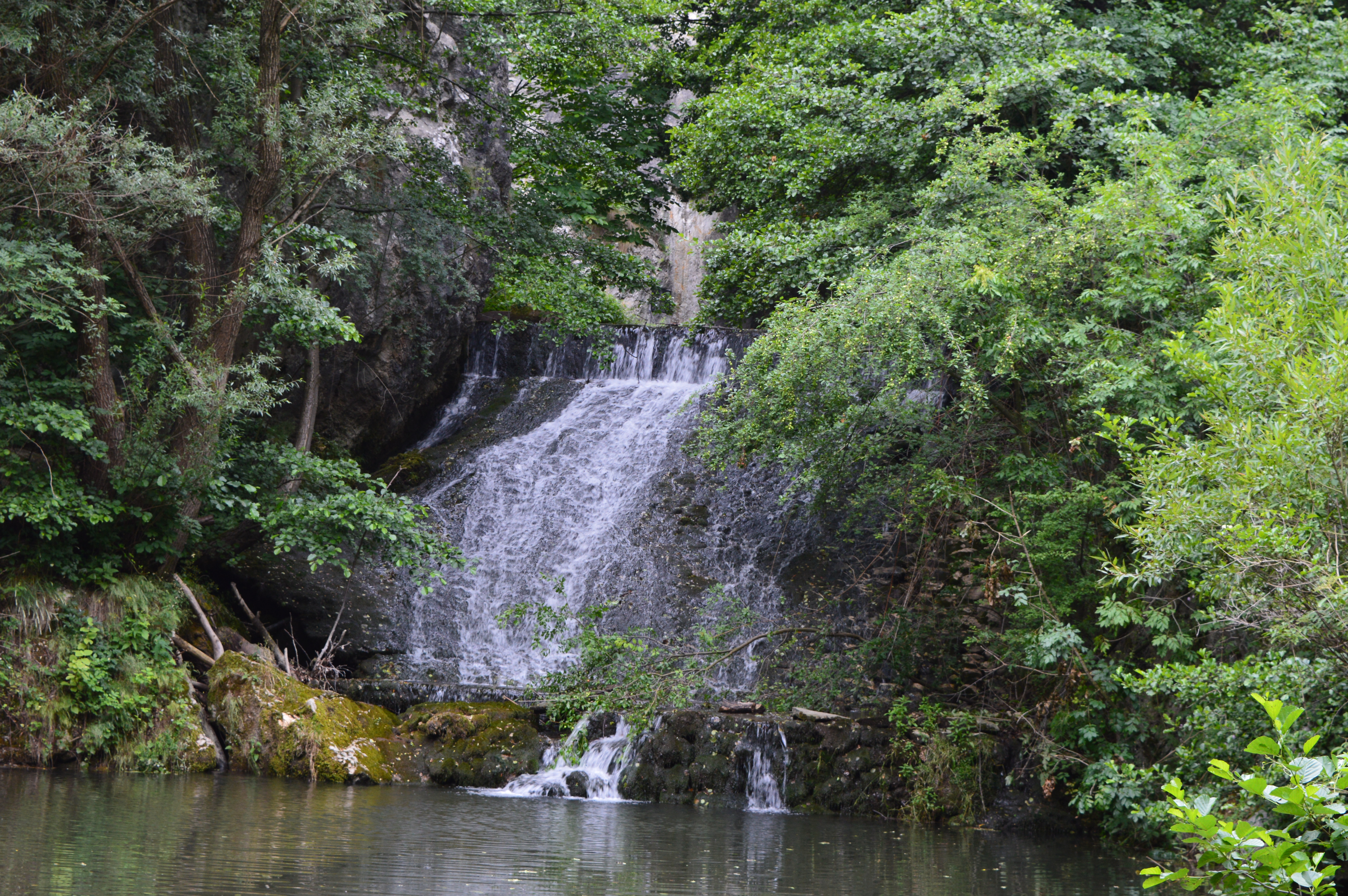 Ово је фотографија заштићеног природног добра у Србији под шифром: СП254 This is a a photo of a natural area in Serbia with ID: СП254 Споменик природе Клисура Осаничке реке